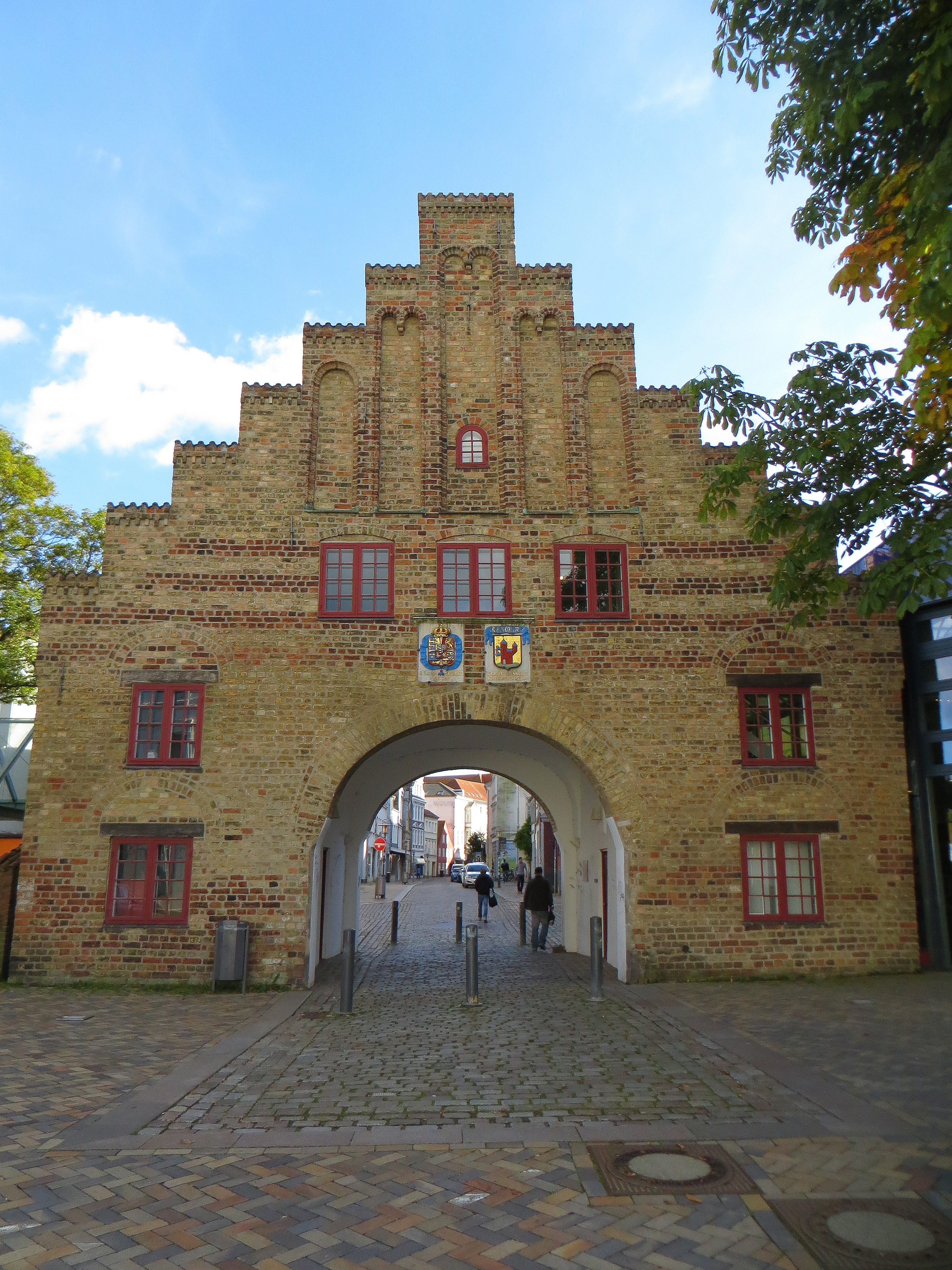 Nordertor, Flensburg 2013, Bild 04